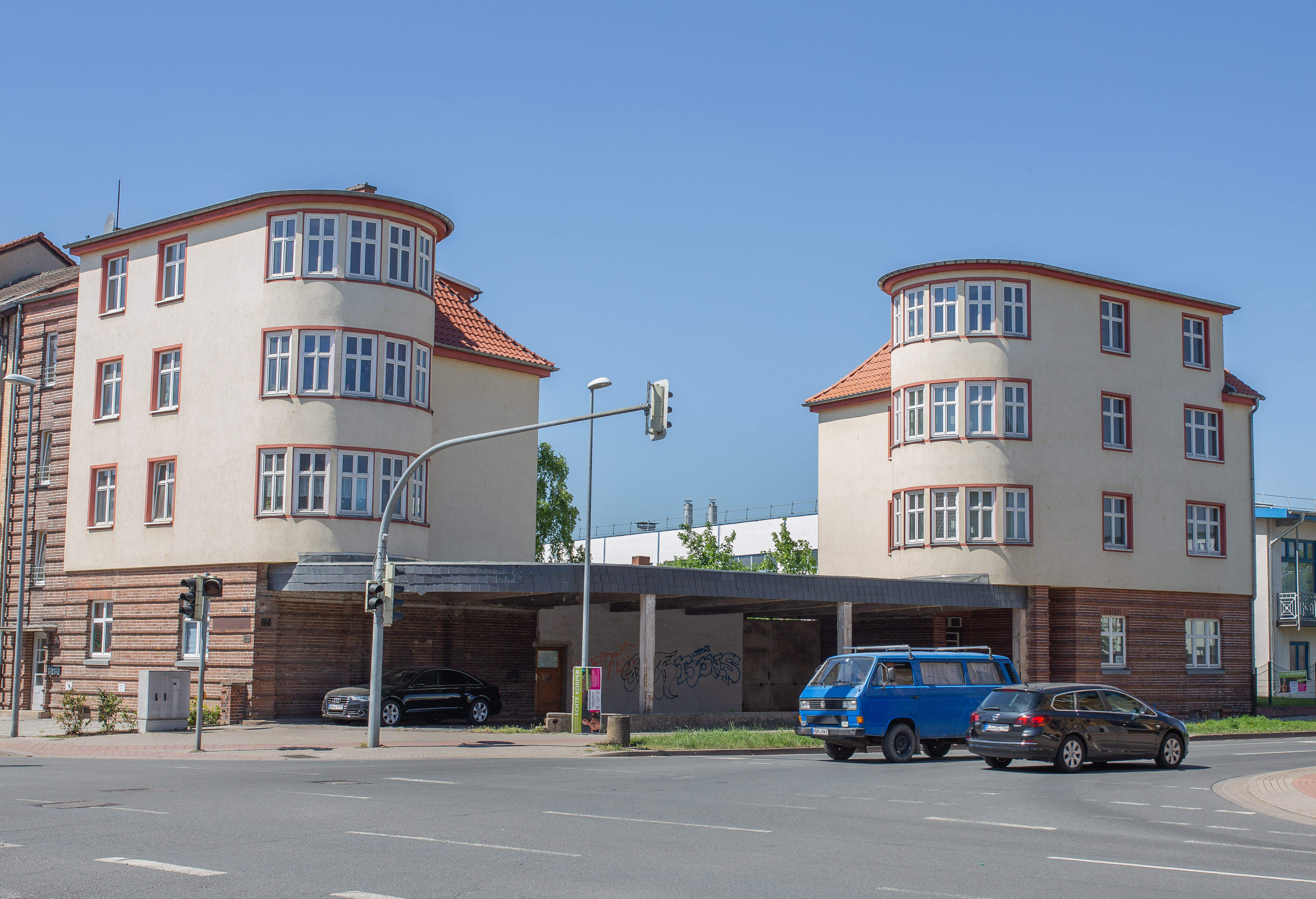 Tankbahnhof der Rhenania-Ossag AG in Nordhausen, Ecke Bochumer Straße/Freiherr-von-Stein-Straße